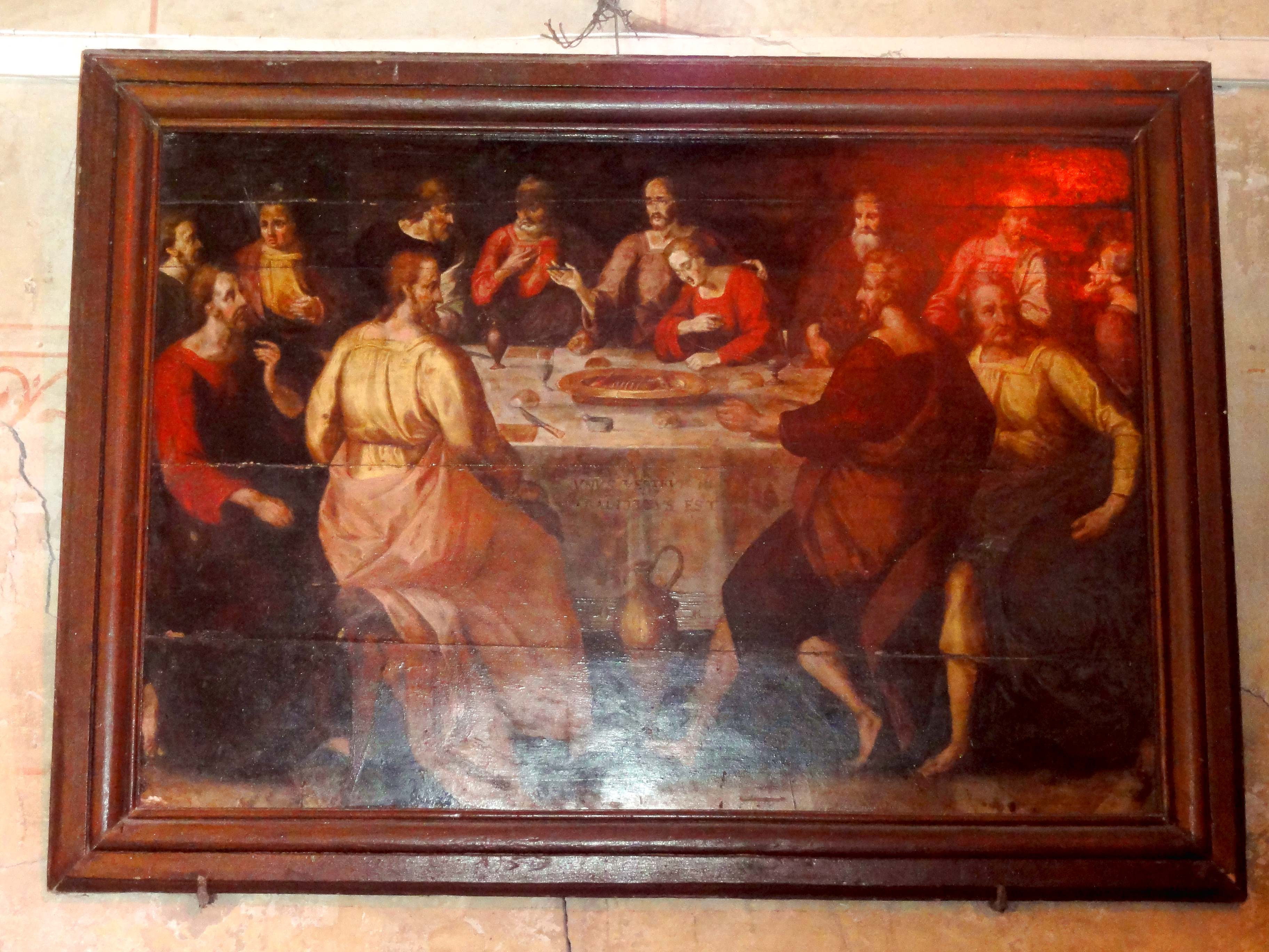 Mobilier de l'église (voir titre).